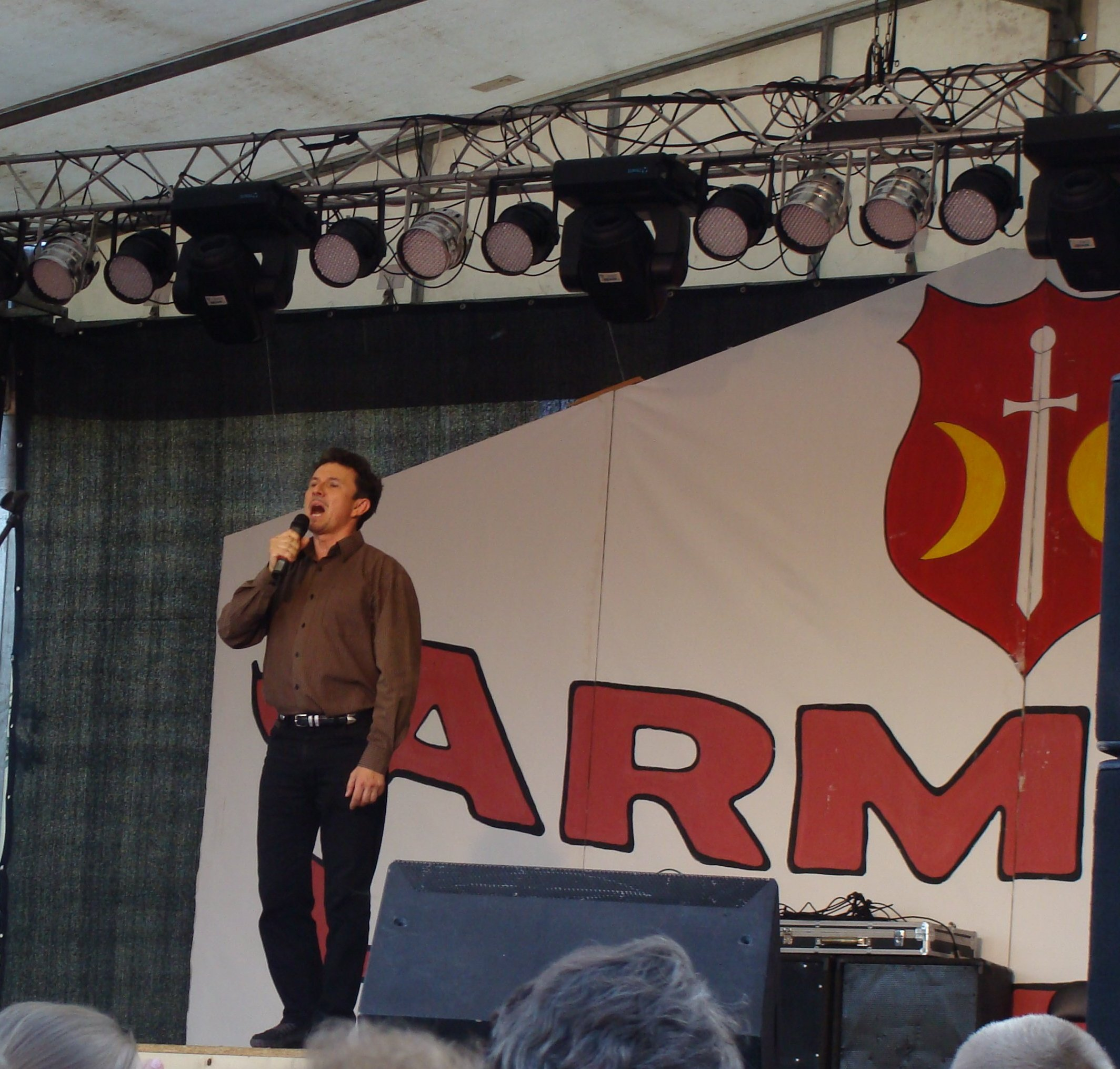 Jacek Wójcicki występuje podczas Jarmarku Kiliana w Skierbieszowie